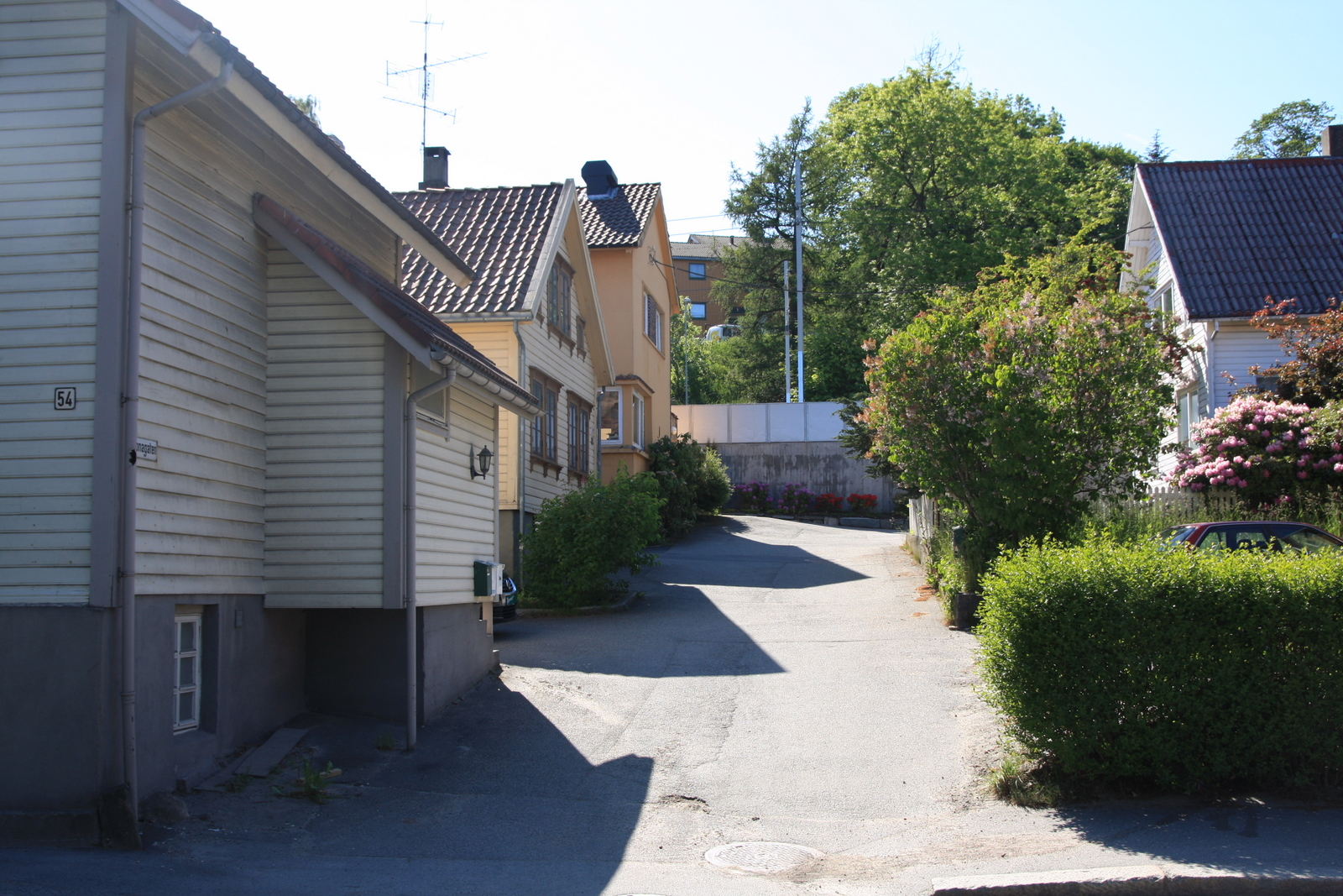 Altonagaten